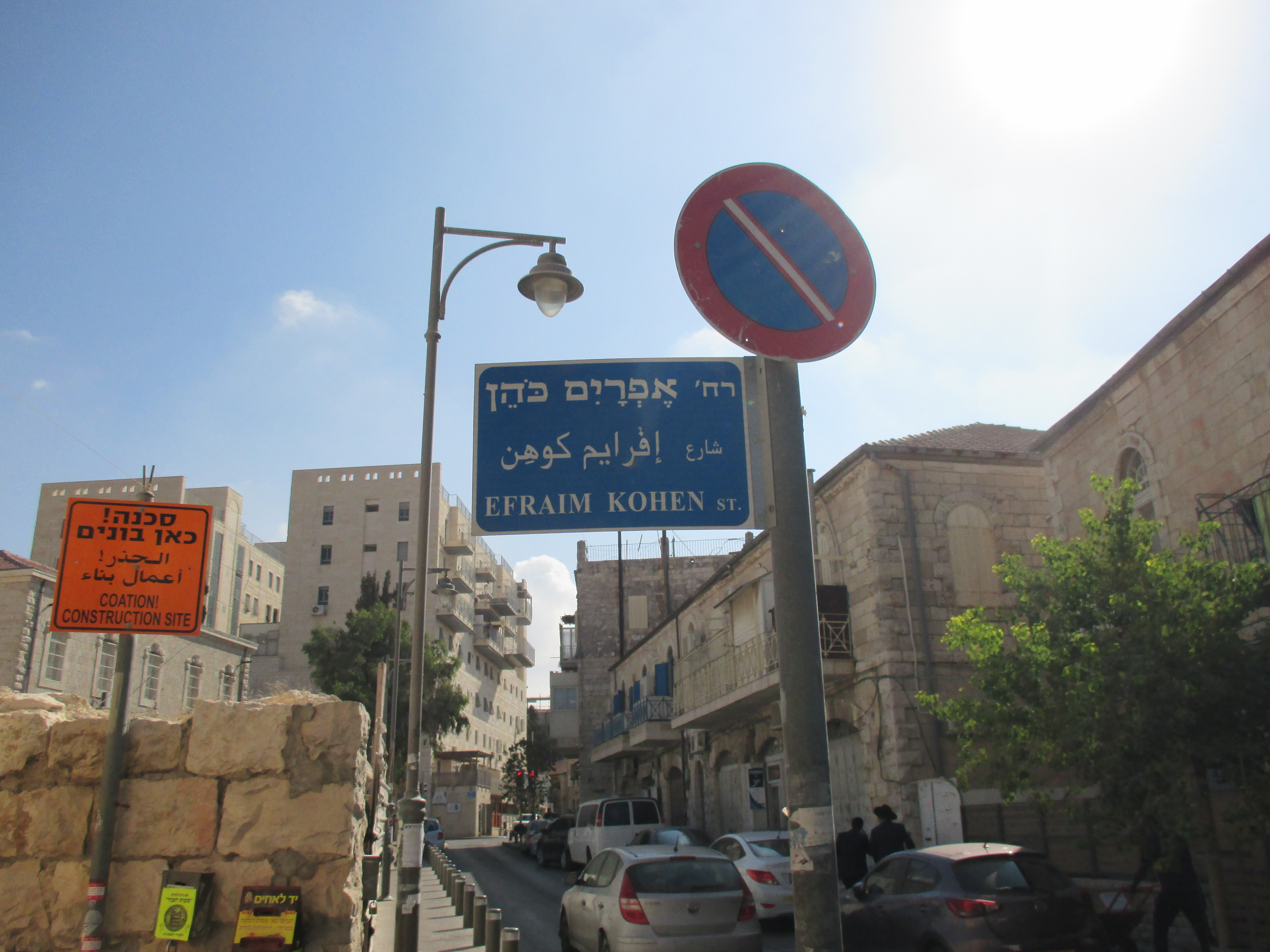 השלט על רחוב אפרים כהן בירושלים.